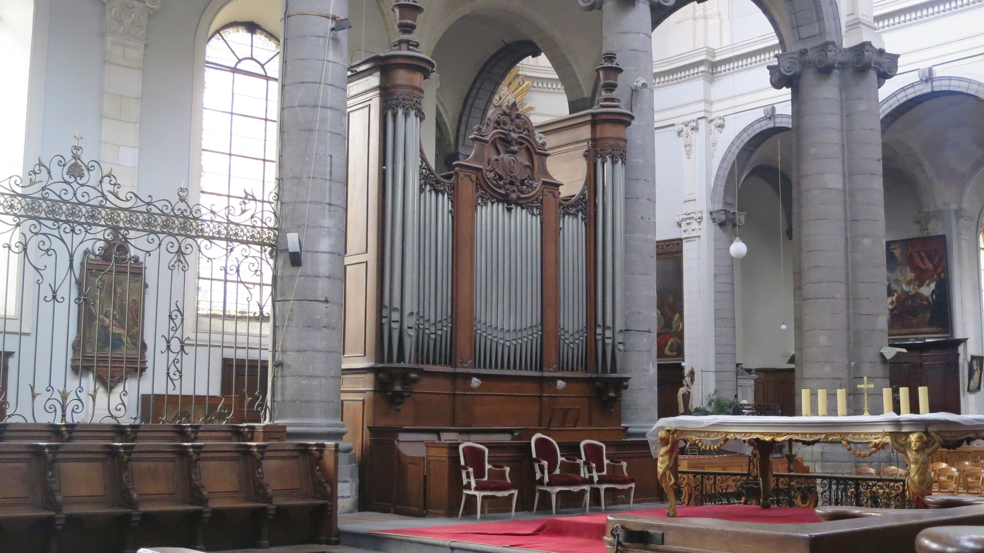 le modeste orgue de chœur